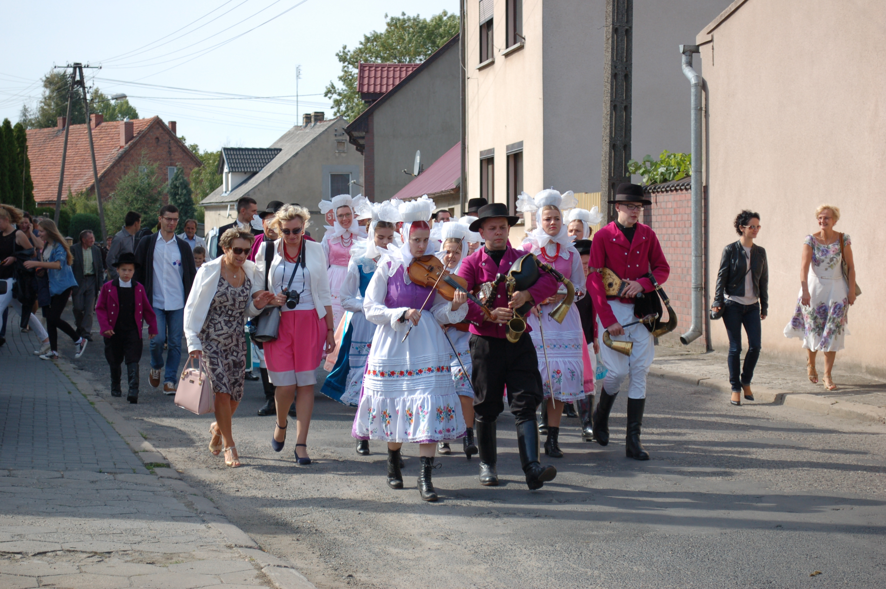 Tradycyjny pochód przez wieś podczas Festiwalu Folkloru i Tradycji w Domachowie na Biskupiźnie w 2015 roku This photo has been taken in the country: Unknown